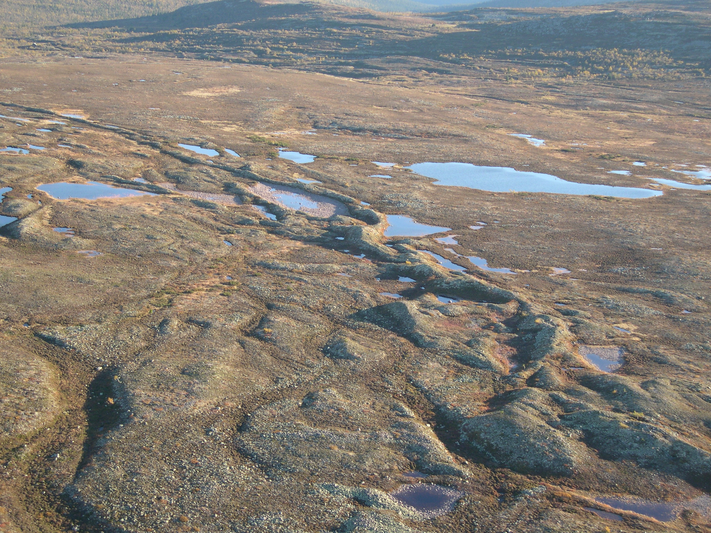 Ås i Fulufjället